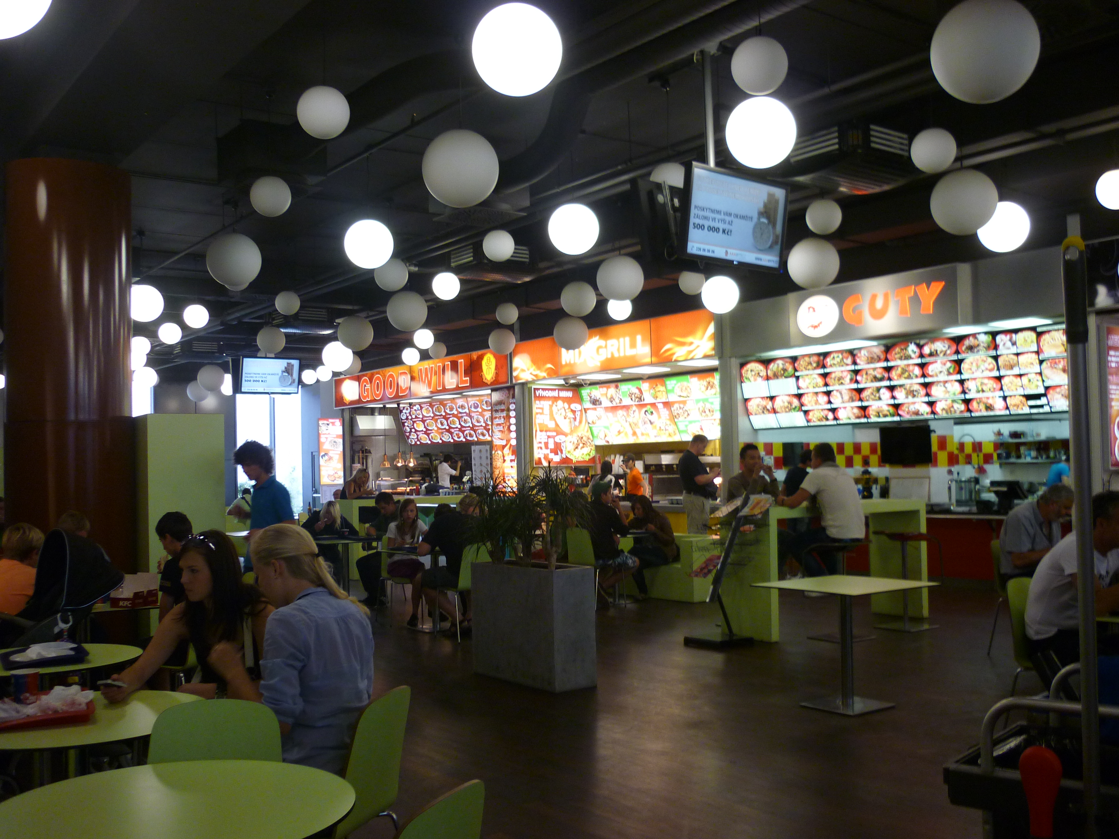 Jídelní kout v OD CPJ